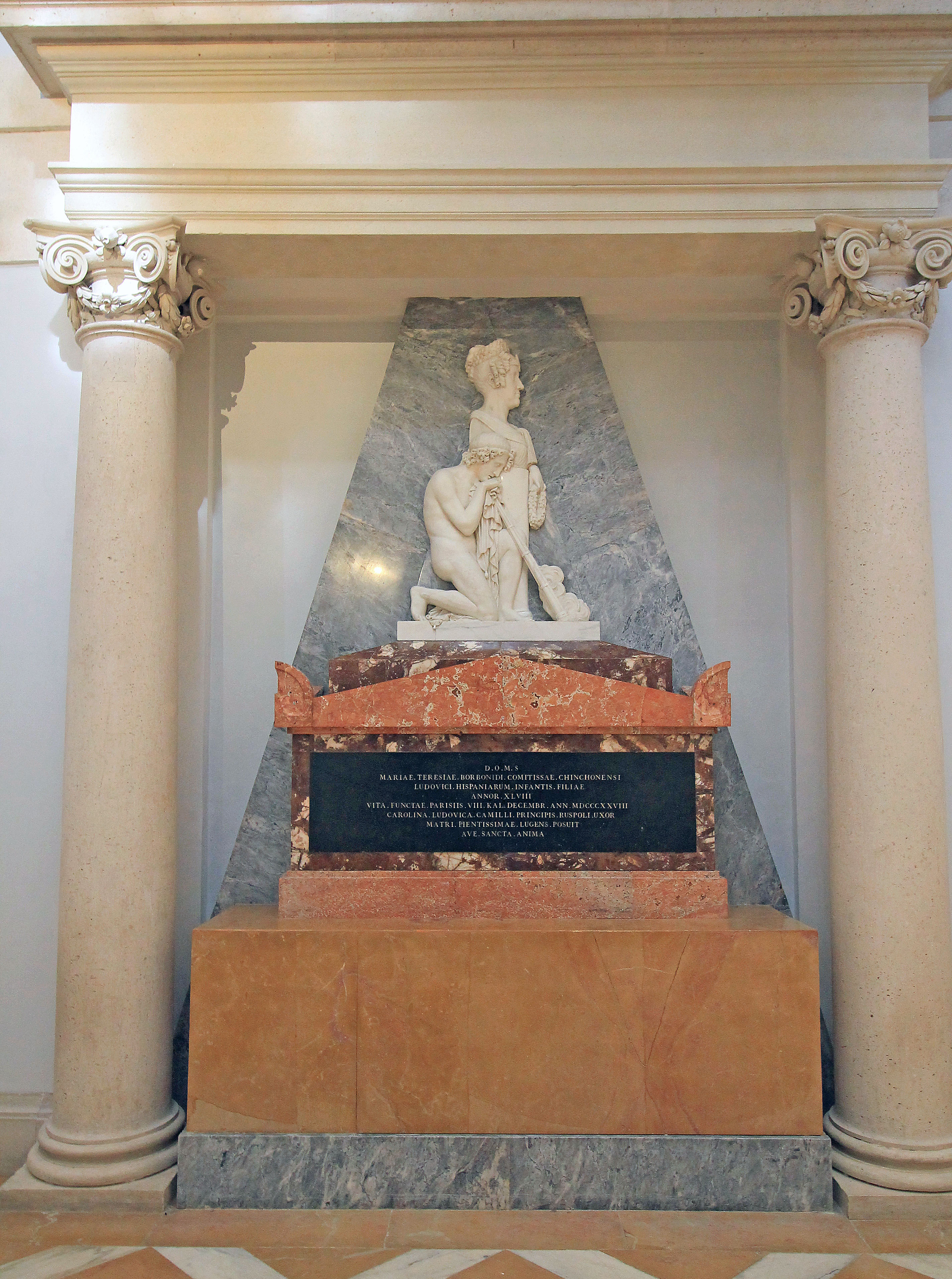 Tomb of María Teresa de Borbón y Vallabriga, 15th Countess of Chinchón.